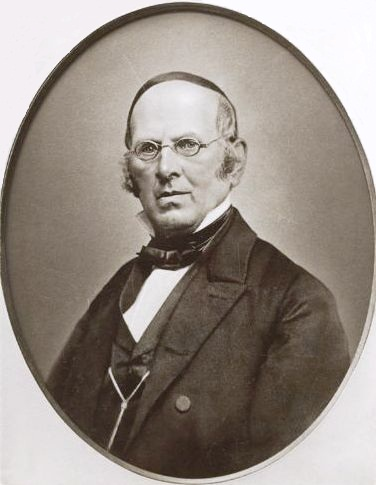 Bildnis des Greifswalder Professors Leopold George (1811–1873)